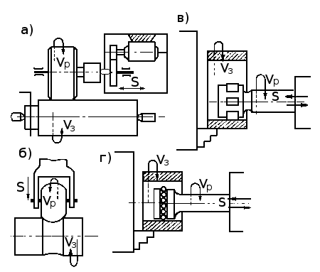 Схема обкрадывания